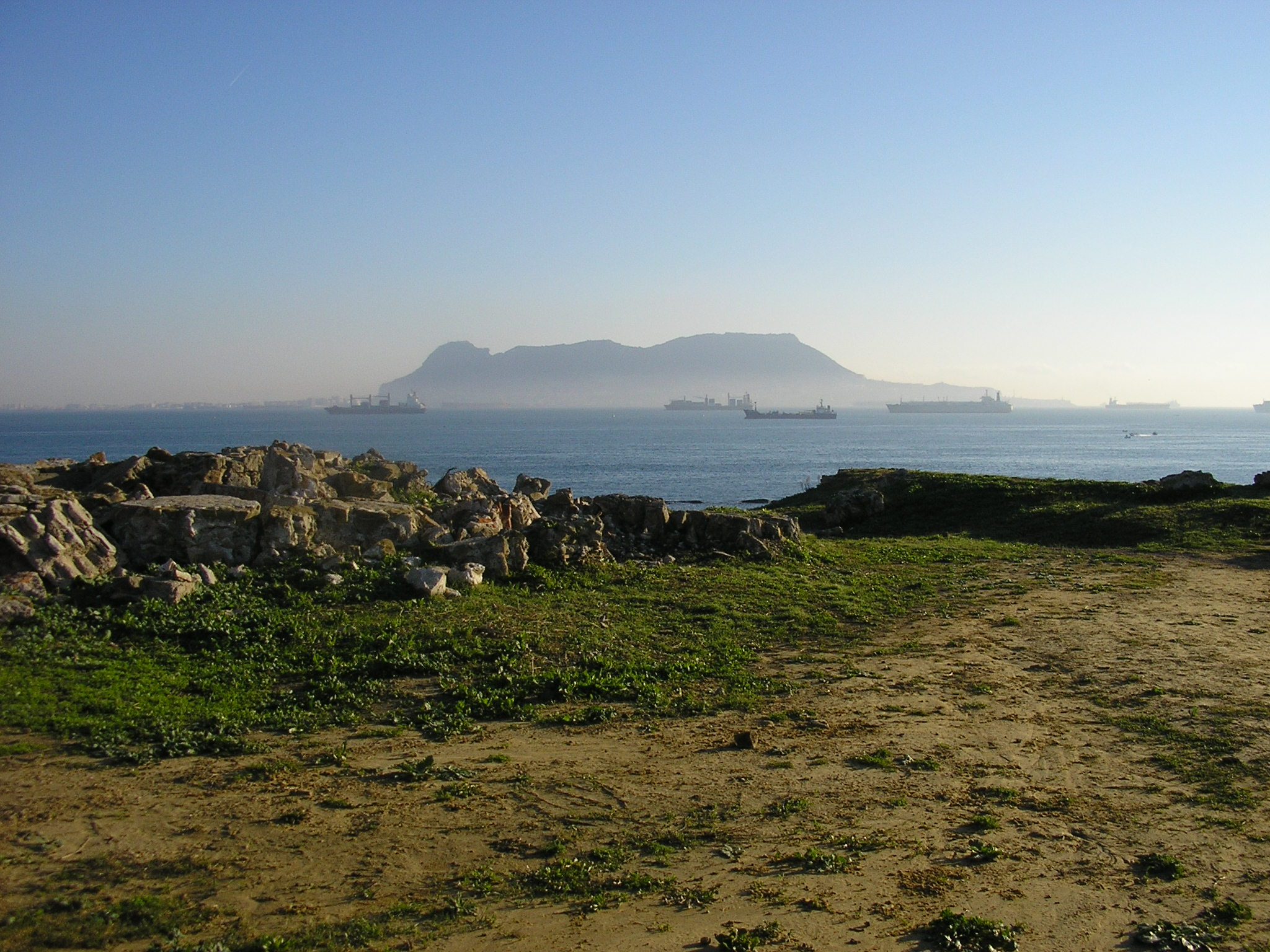 Punta de San García, en Algeciras, Andalucía, España. Al fondo el peñón de Gibraltar, en primer término los restos del Fuerte de San García.